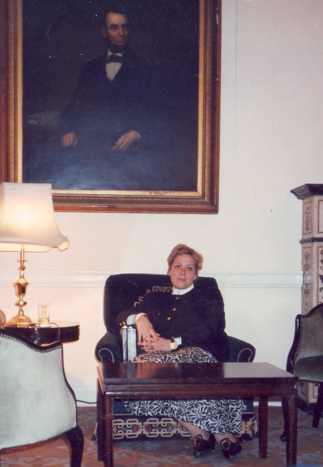 Любов Георгиева в Съюза на англоговорещите в Лондон